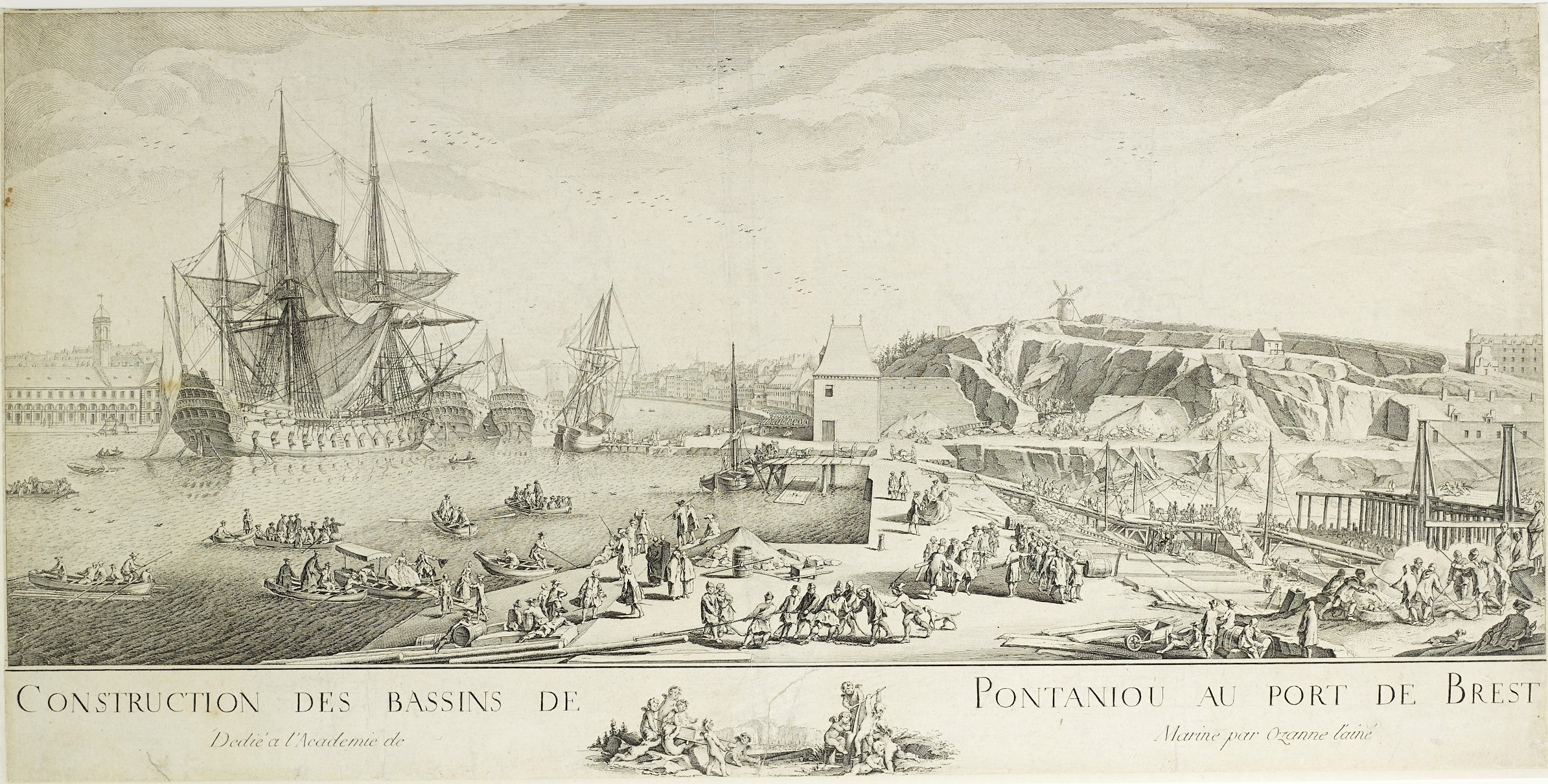 Construction des bassins de Pontaniou au port de Brest (Nicolas Ozanne (1728-1811), musée franco-américain du château de Blérancourt). Eau-forte, 31,2 x 63 cm.